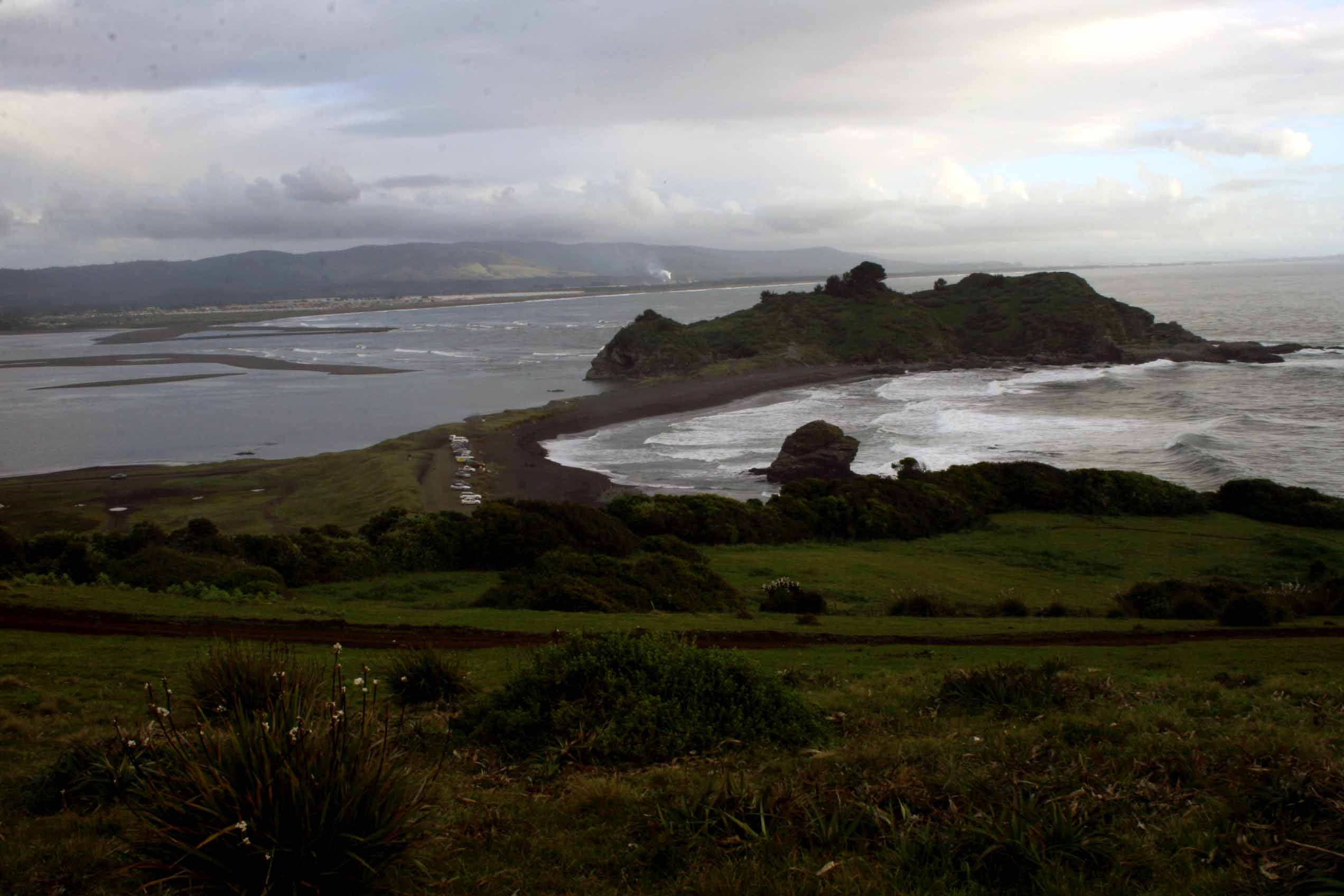 Desembocadura río Bío-Bío.